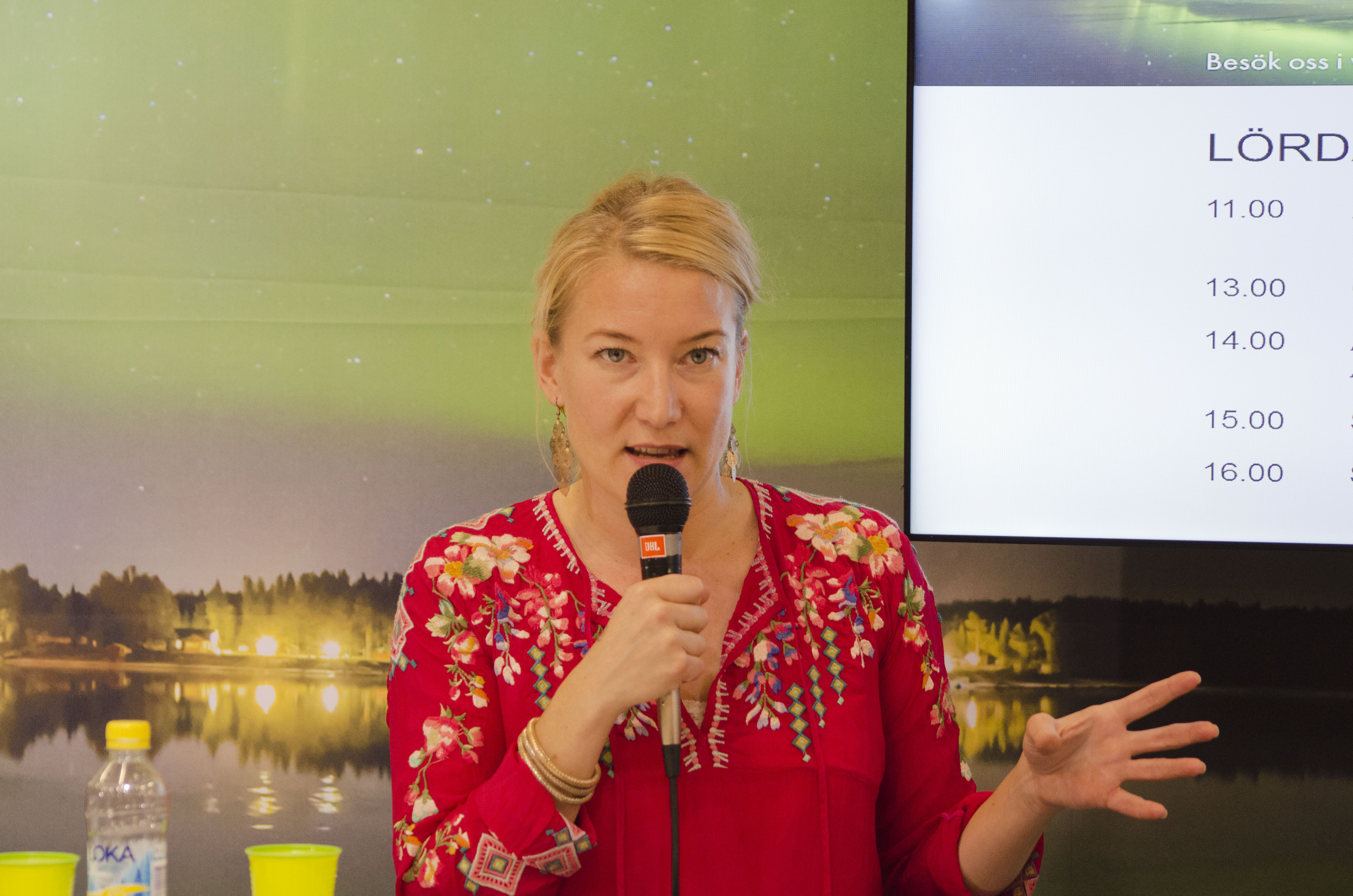 Elin Olofsson på Göteborgs Bokmässa 2016.